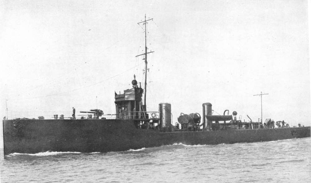 British destroyer HMS Defender.